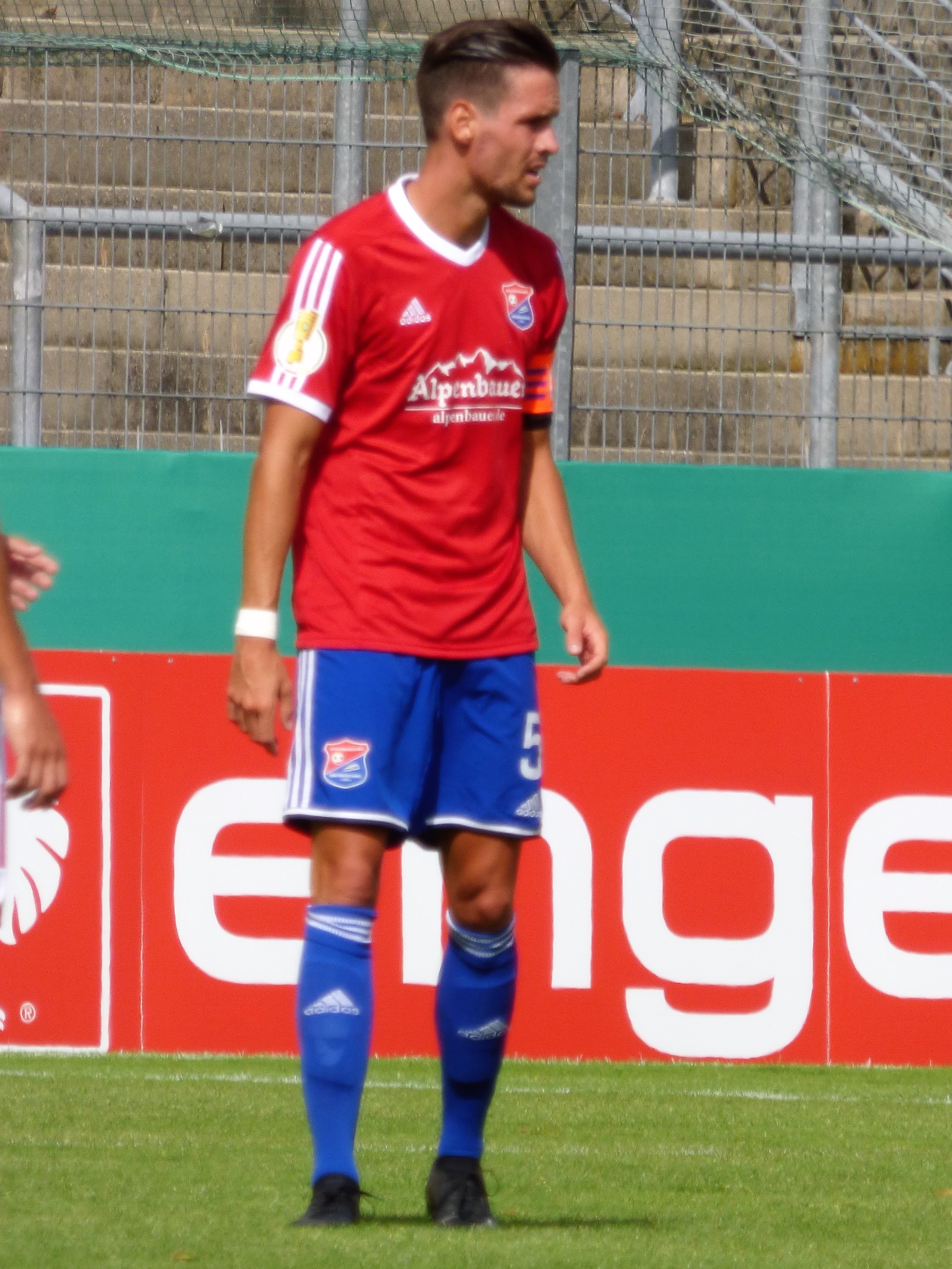 Welzmüller, Josef Unterhaching